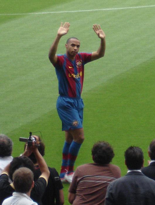 First day on Camp Nou (introduction) - Primer día en el Camp Nou (presentación)